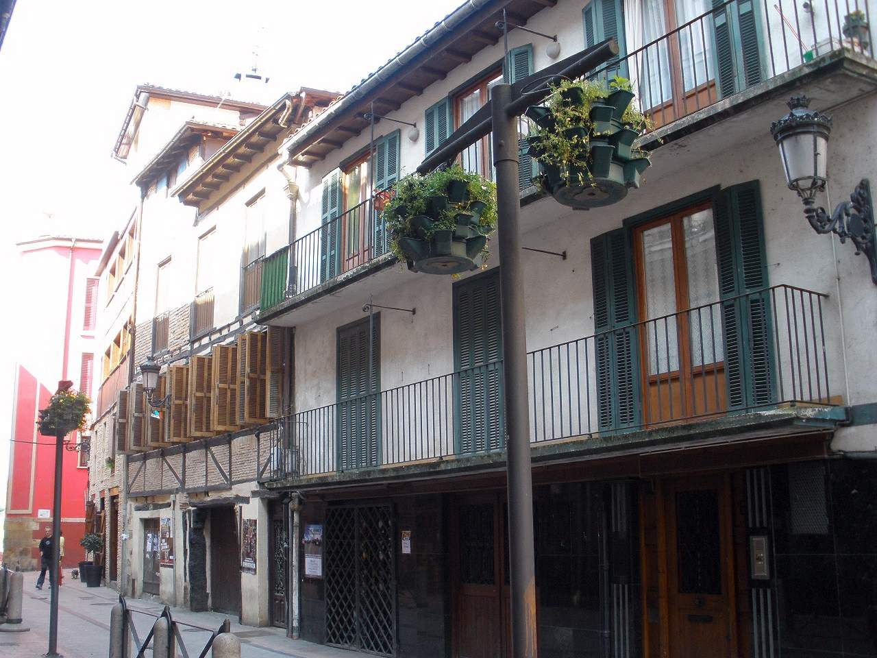 Ordizia, Guipúzcoa